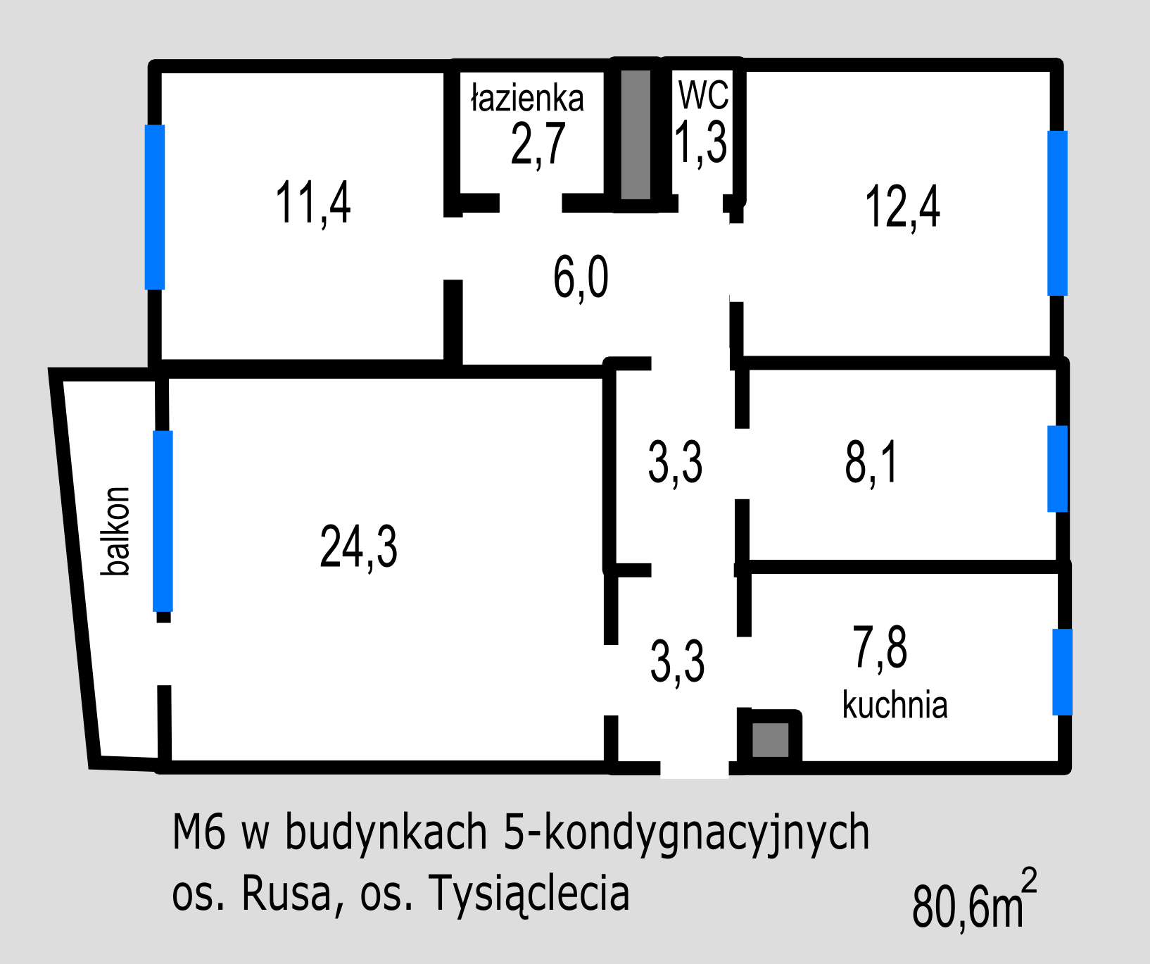 M6 (80,6 m²) w budynkach 5-kondygnacyjnych na os. Rusa i Tysiąclecia (S-11)